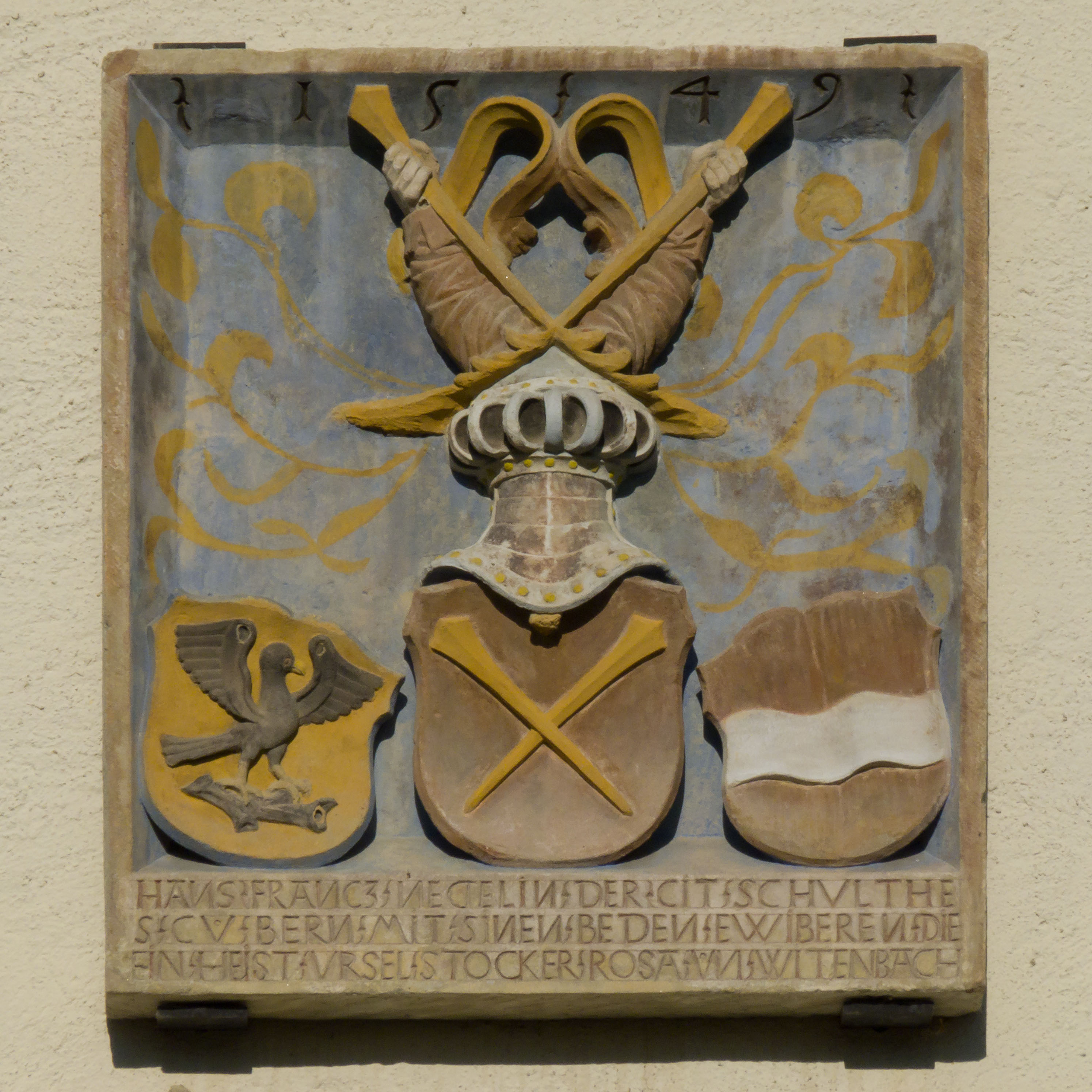 Wappen des Berner Schultheissen Hans Franz Nägeli (1497-1579)und seiner zwei Ehefrauen Ursula Stokar und Rosa Wyttenbach, am von ihm im Jahr 1549 errichteten Anbau am Schloss Bremgarten